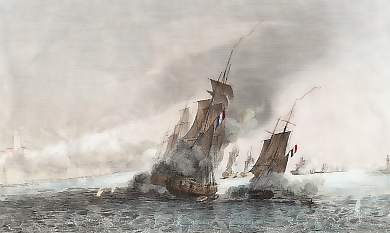 Combat du Tage, 11 juillet 1831. Gravure de 1837